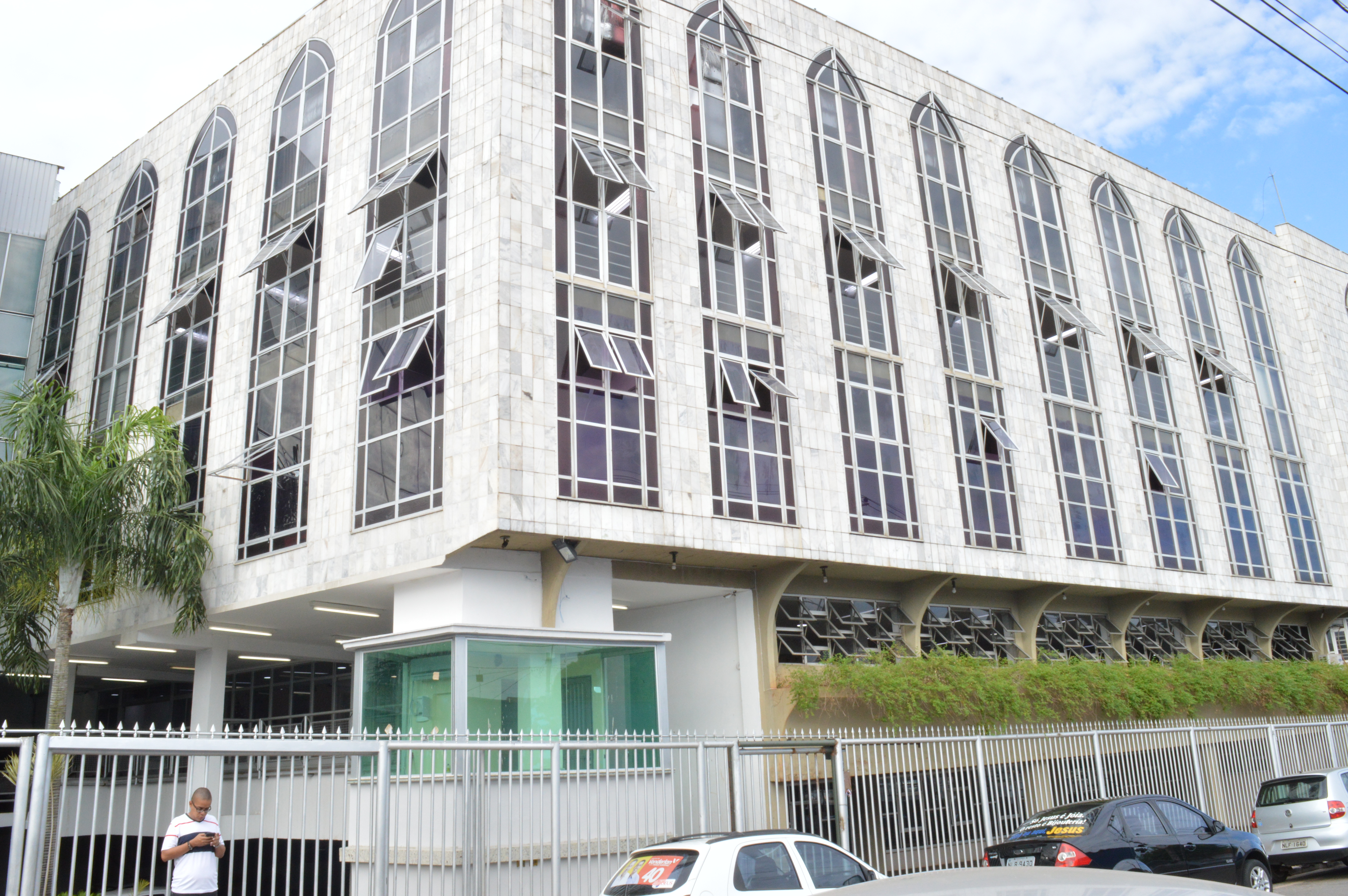 Vista da Igreja Assembleia de Deus no bairro Campinas, em Goiânia. Foto de 23 de outubro de 2016.